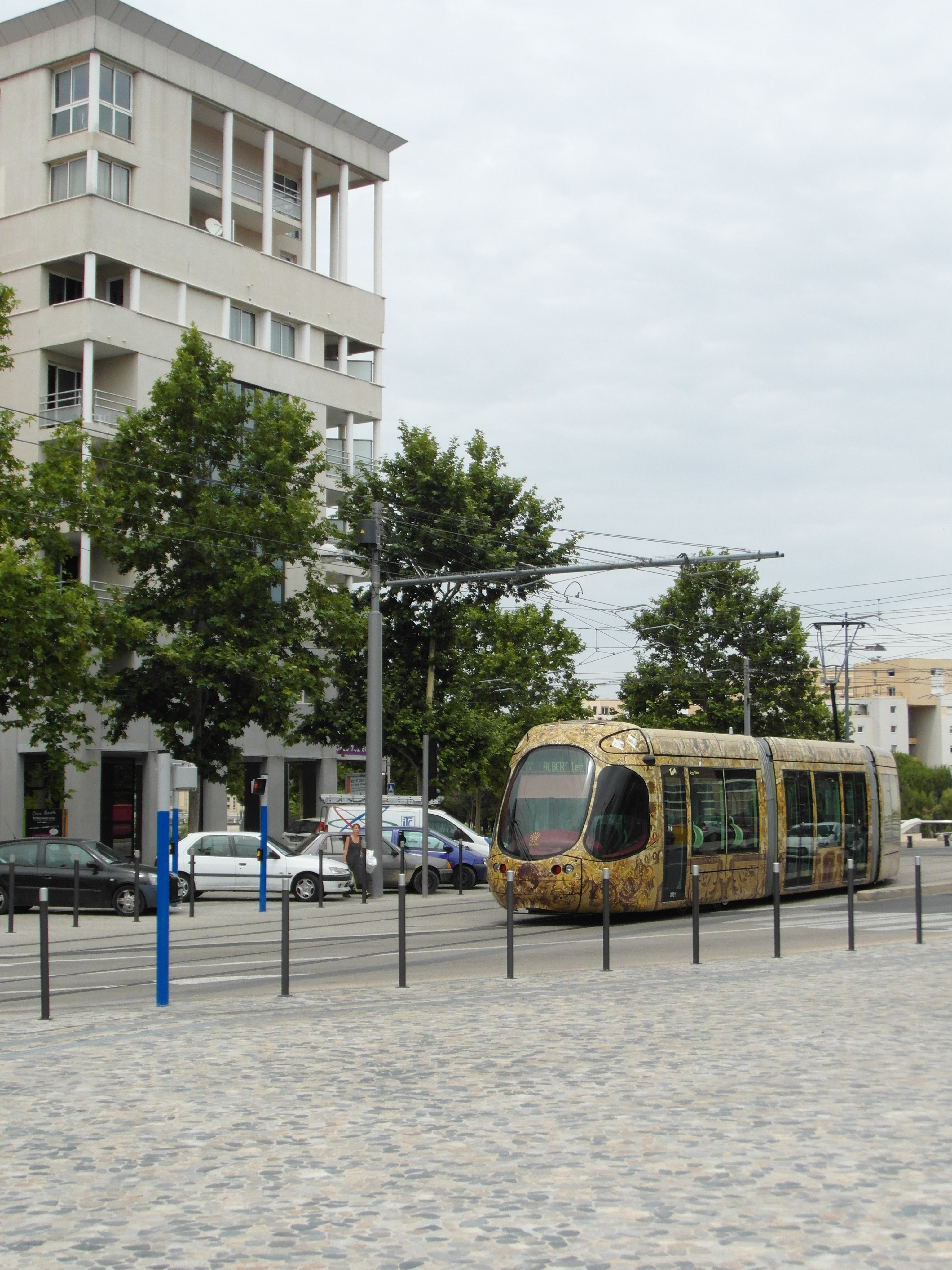 Montpellier - Tramway - Ligne 4 - Hôtel de Ville